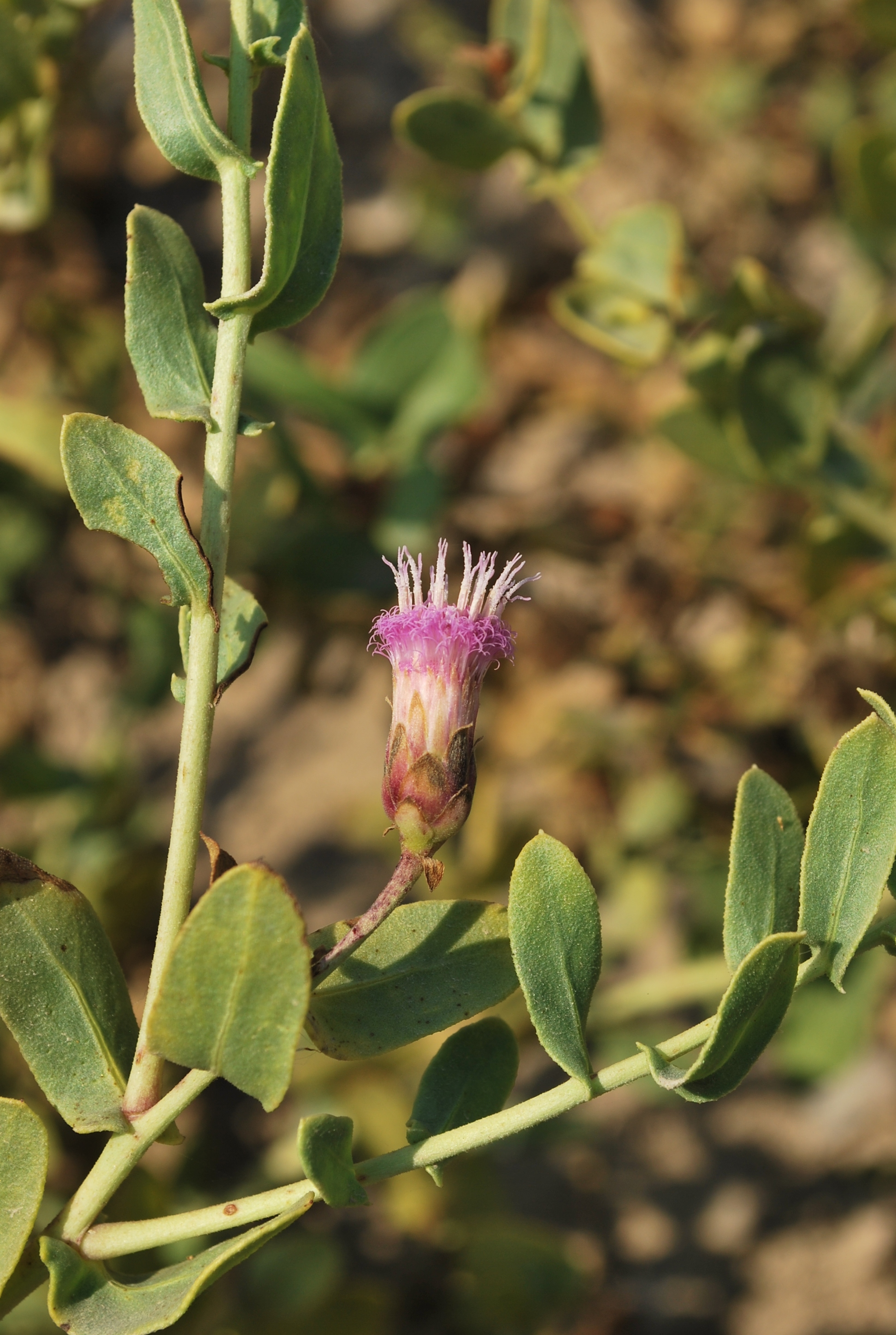 Изображение растения Karelinia caspia, место съемки: Узбекистан, Ферганская долина, Наманганская область, окрестности кишлака Калгандарья, дата съемки: 8.11.2012 г.